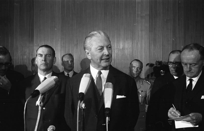 20 Jahre NATO. Bundeswehrparade auf dem Nürburgring. (Mitte: Bundeskanzler Kiesinger, links: BM Schröder)